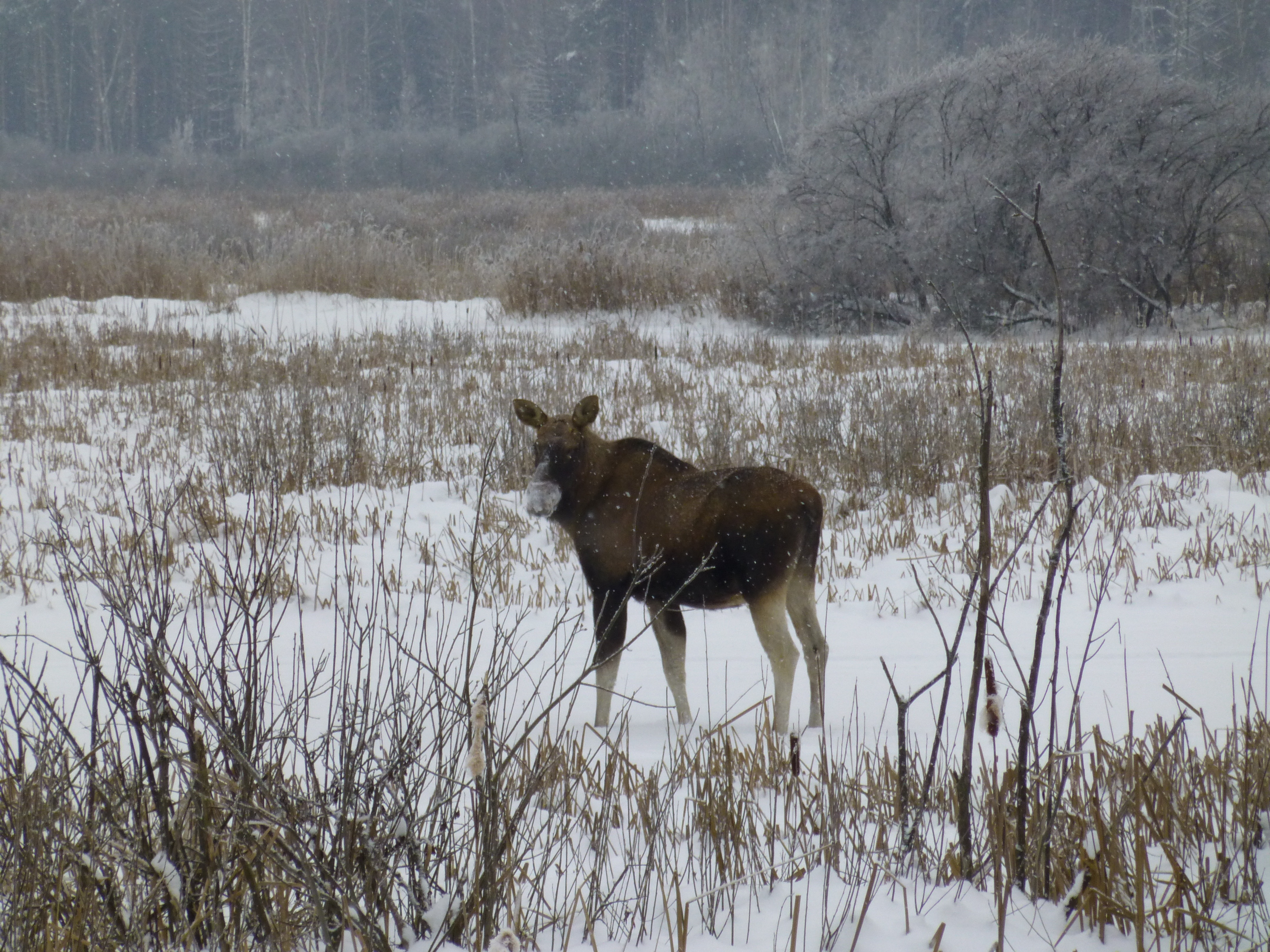 Elchkuh (Alces Alces) im NP Elchinsel, Moskau